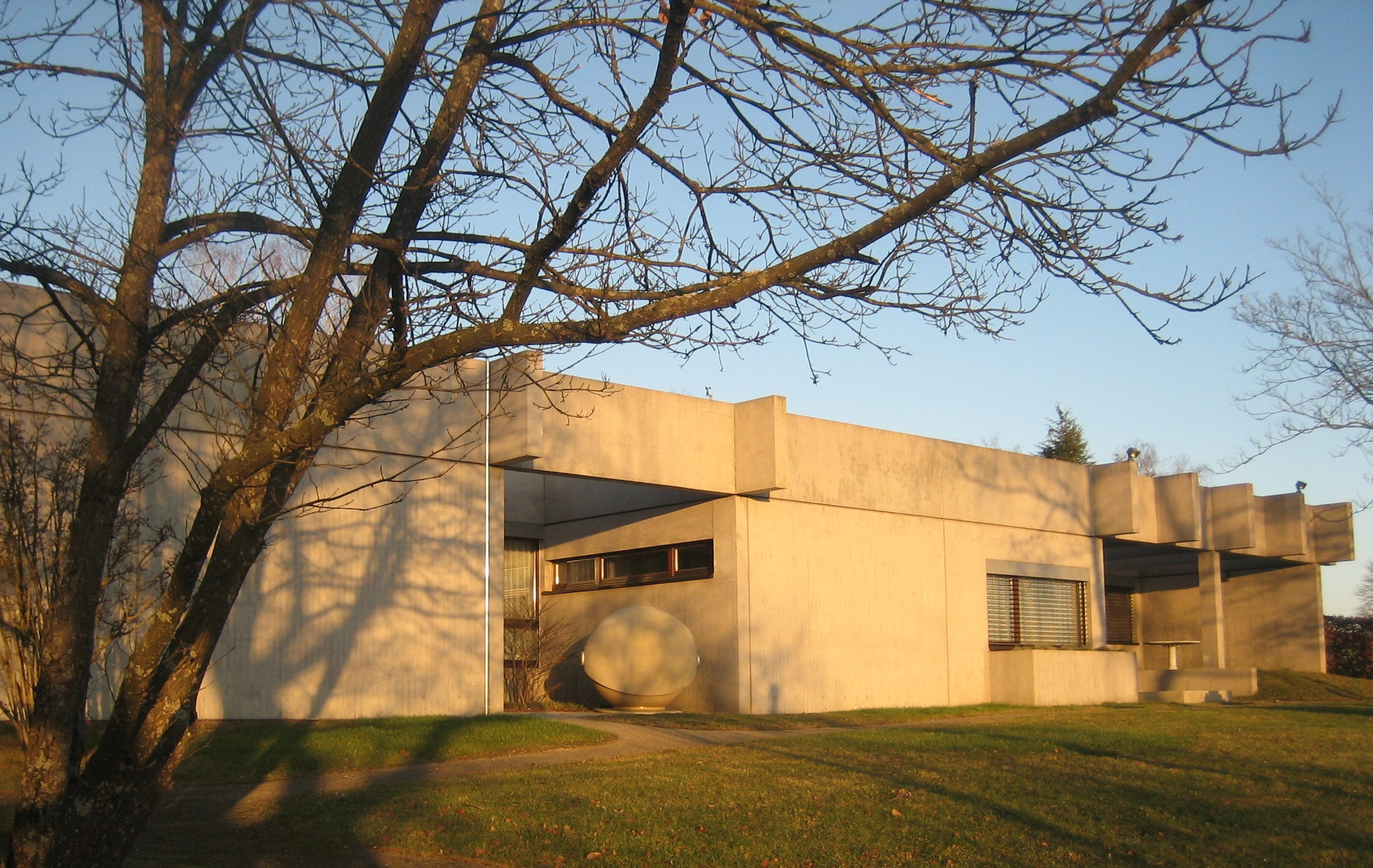 Wohn- und Atelierhaus Dr. Domnick in Nürtingen